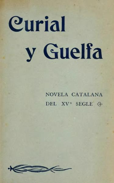 ANÒNIM, Curial y Güelfa. Novela catalana del quinzen segle. Publicada á despeses y per encarrech de la Real Academia de Buenas Letras per Antoni Rubió y Lluch. Estampa de E. Redondo, Barcelona, 1901. Es tracta de la primera publicació de Curial e Güelfa.